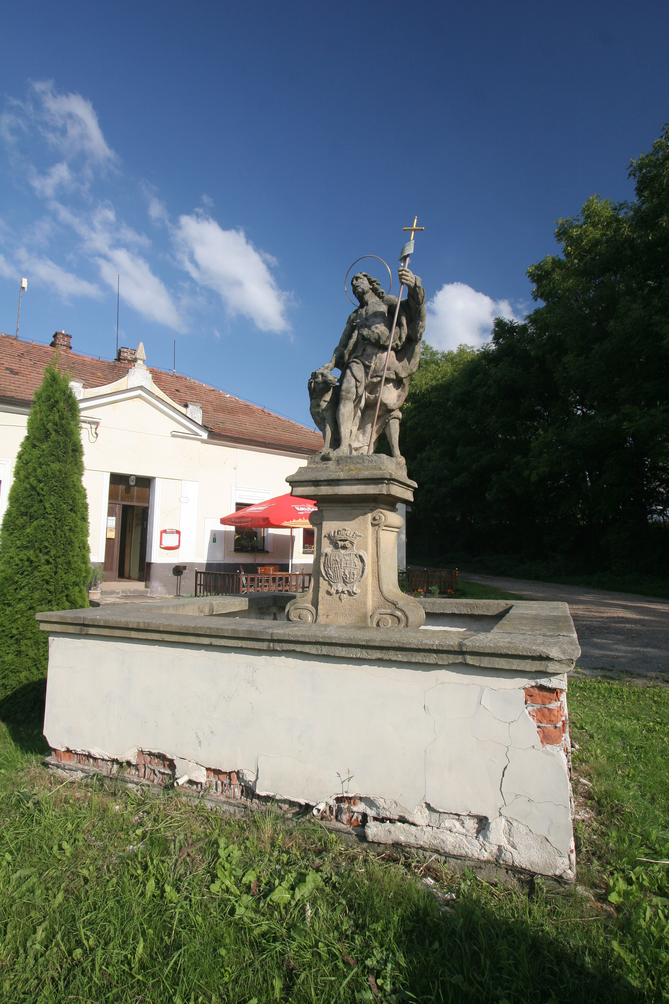 Socha sv. Jana Křtitele (Lubno), náves, Lubno